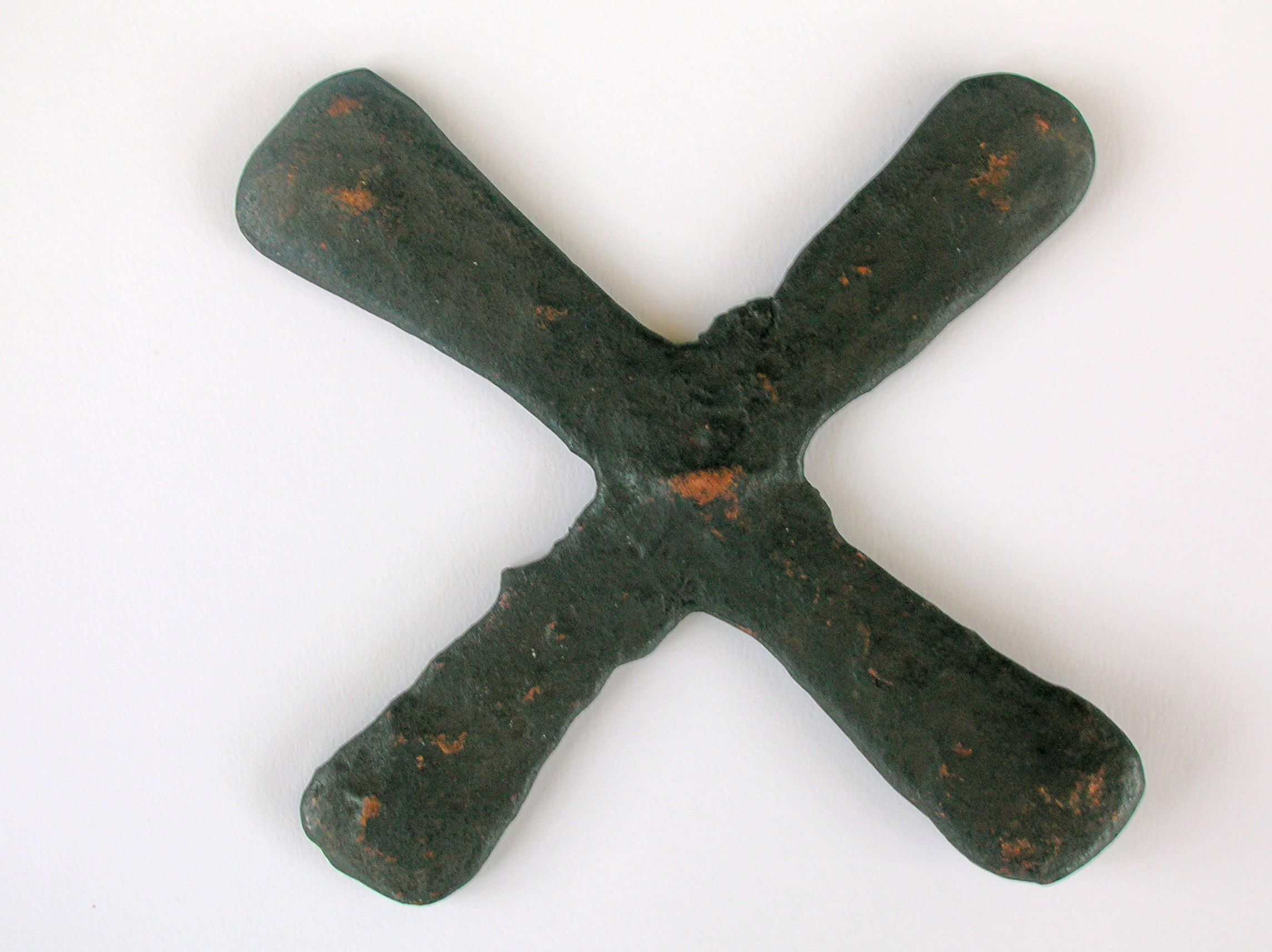 a Katanga cross